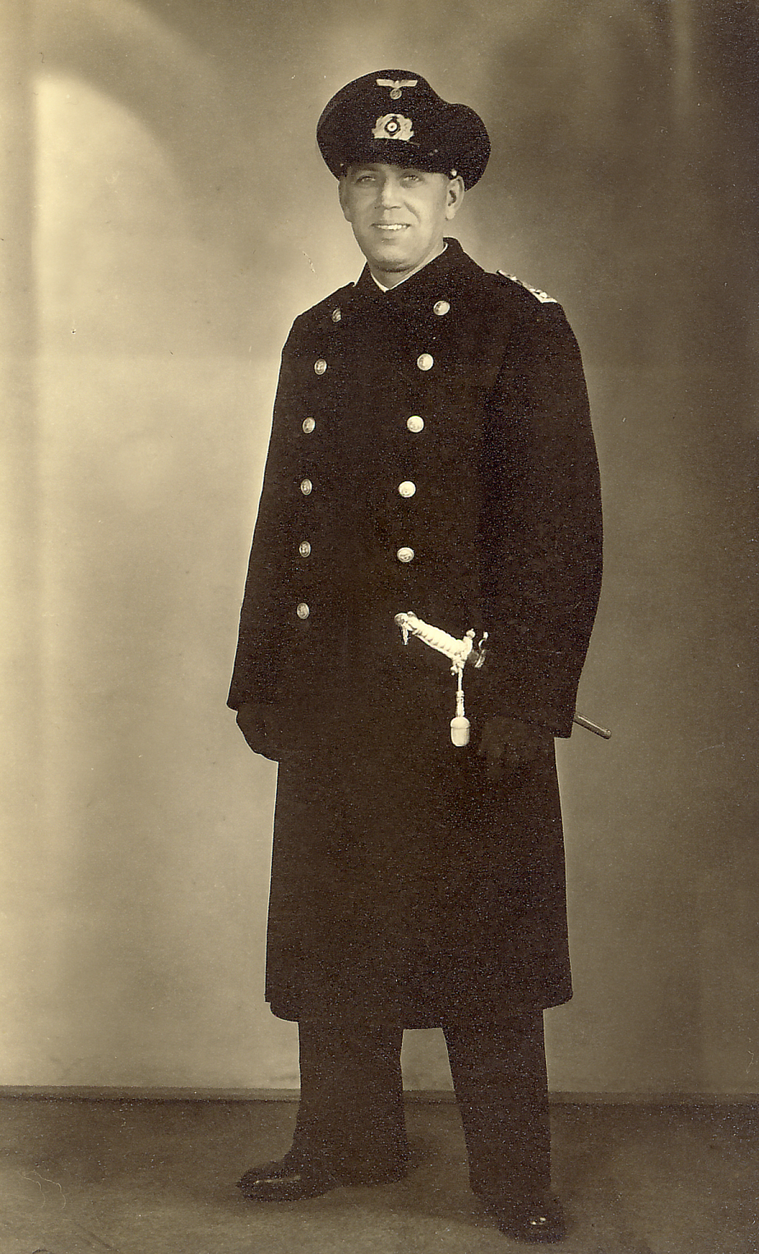 Otto Reckstat als Angehöriger der Kriegsmarine während des Zweiten Weltkrieges